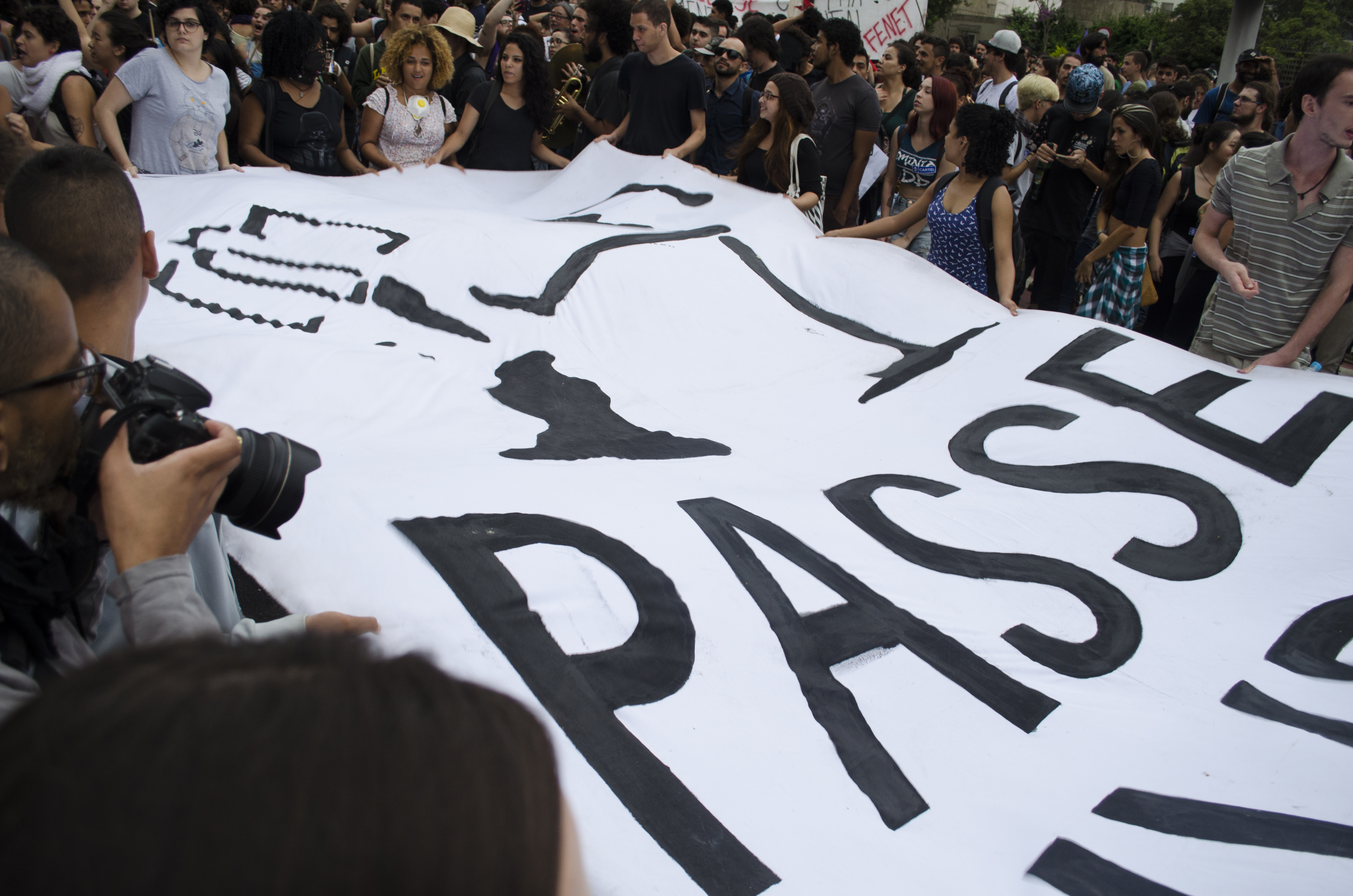 Segundo ato contra o aumento das tarifas no transporte público na cidade de São Paulo, 2016.